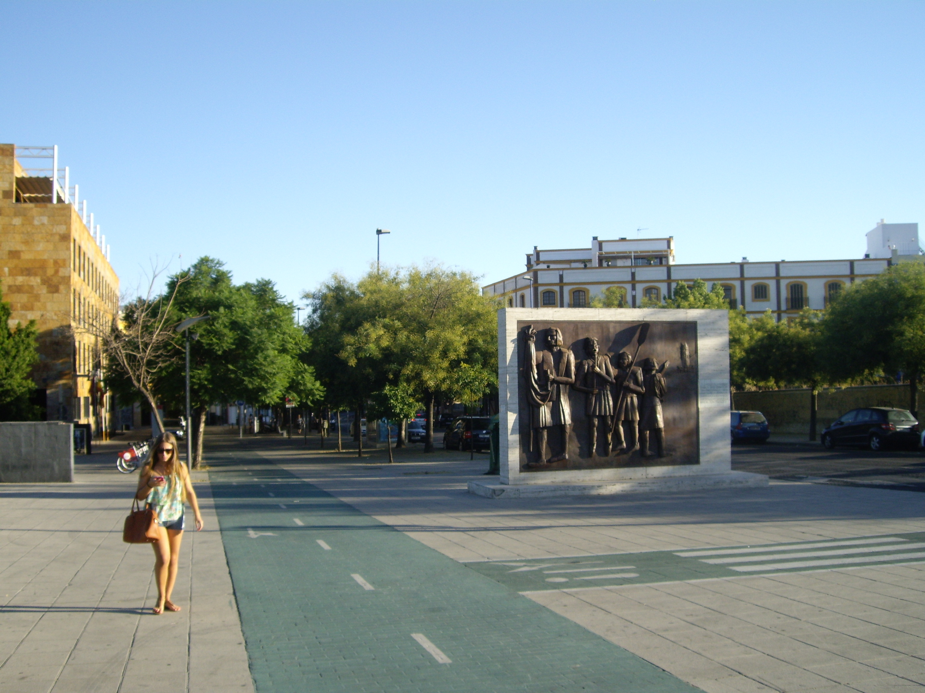 Plaza de Chapina de Sevilla